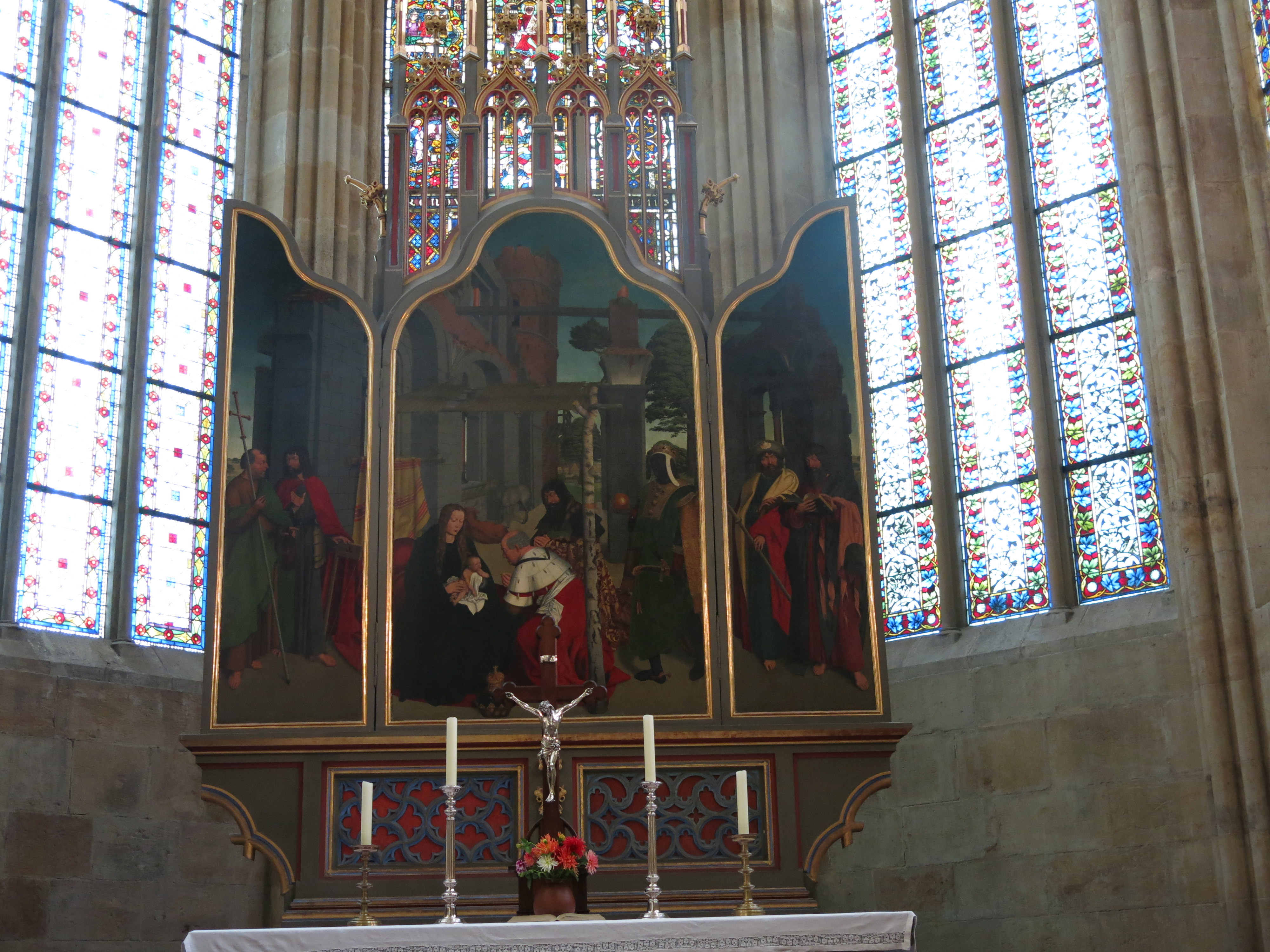 Meißner Dom - der Hochaltar im Chorraum